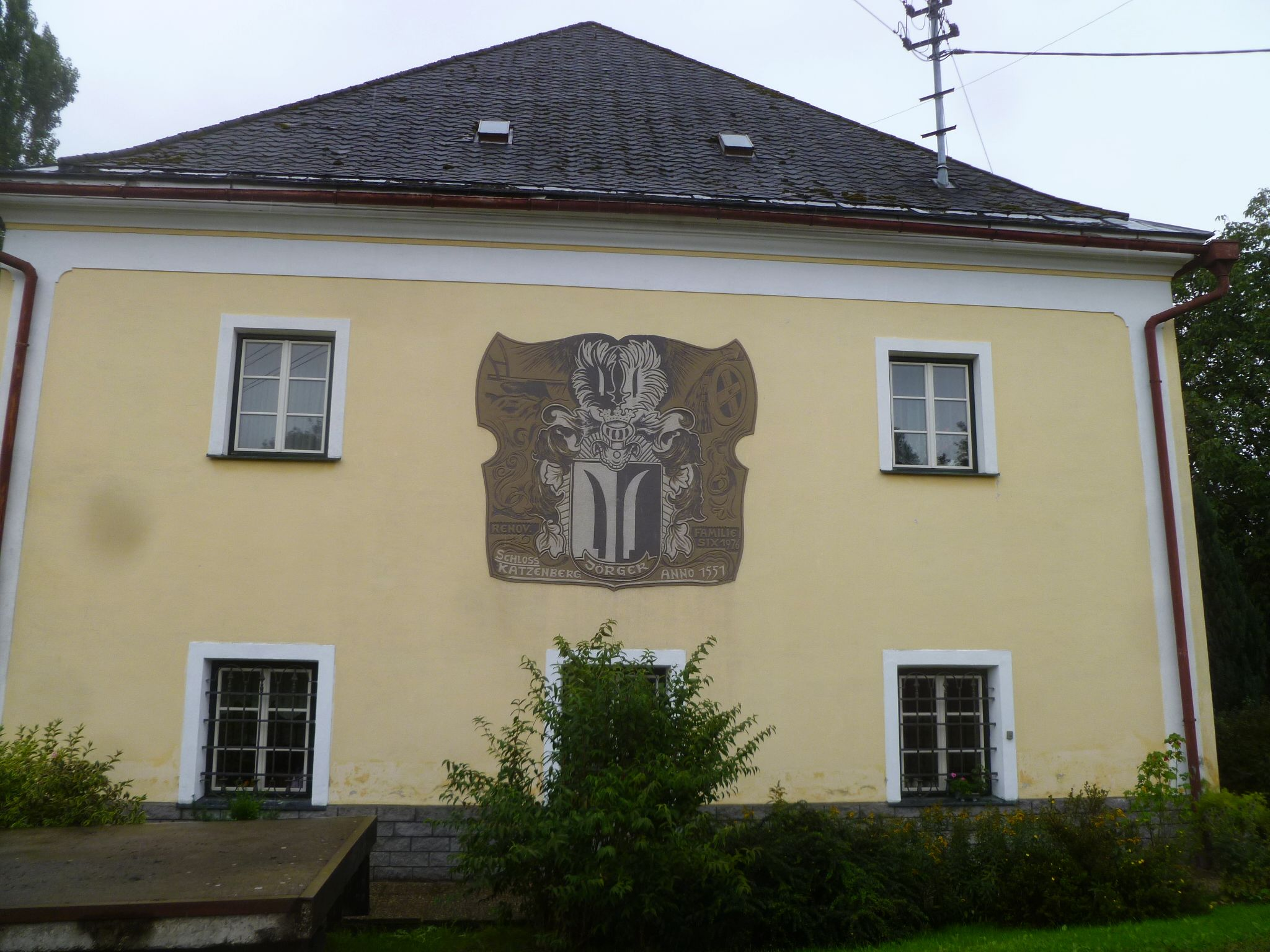 Schloss Katzenberg Seitenansicht